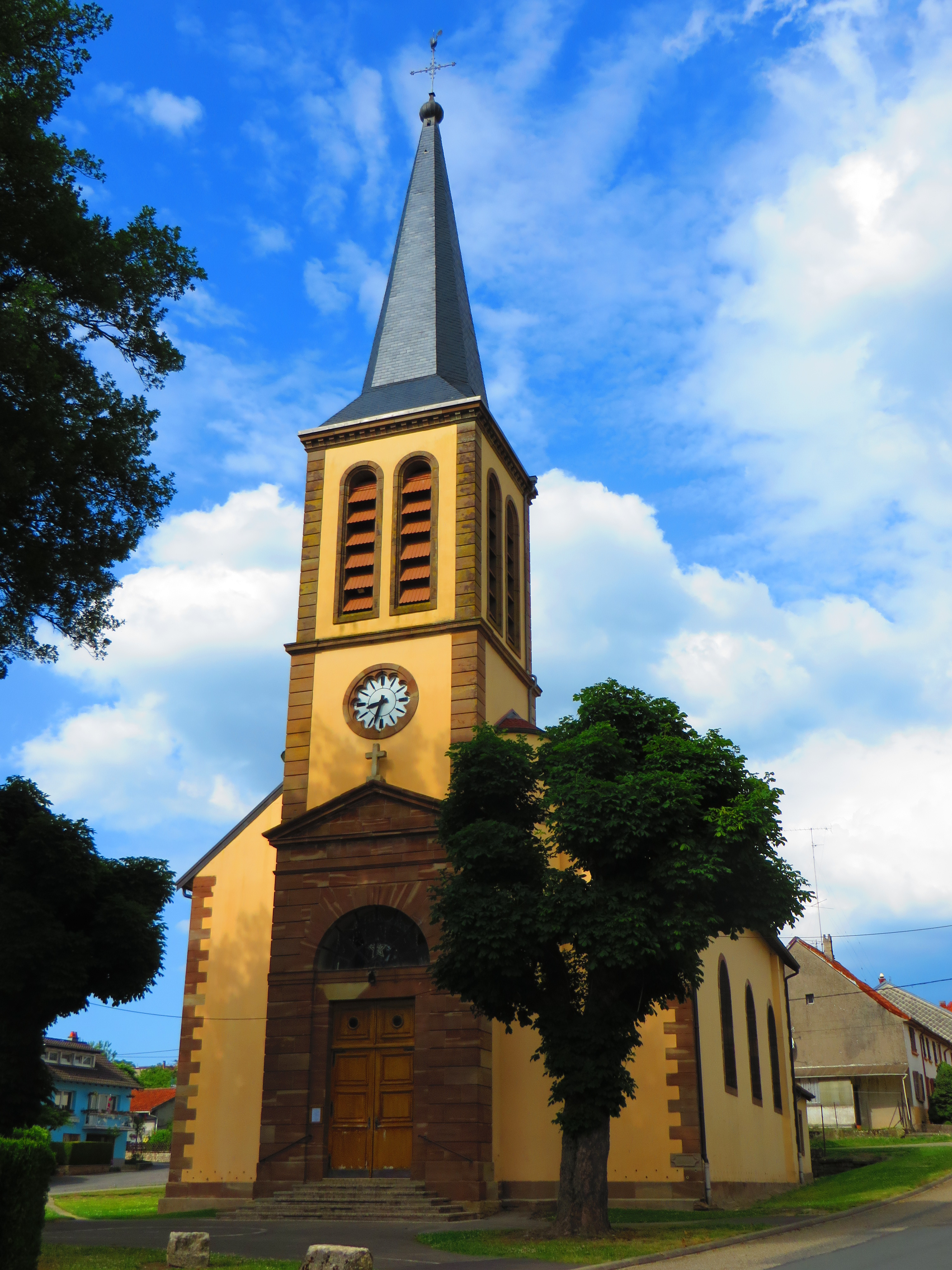 Voyer eglise